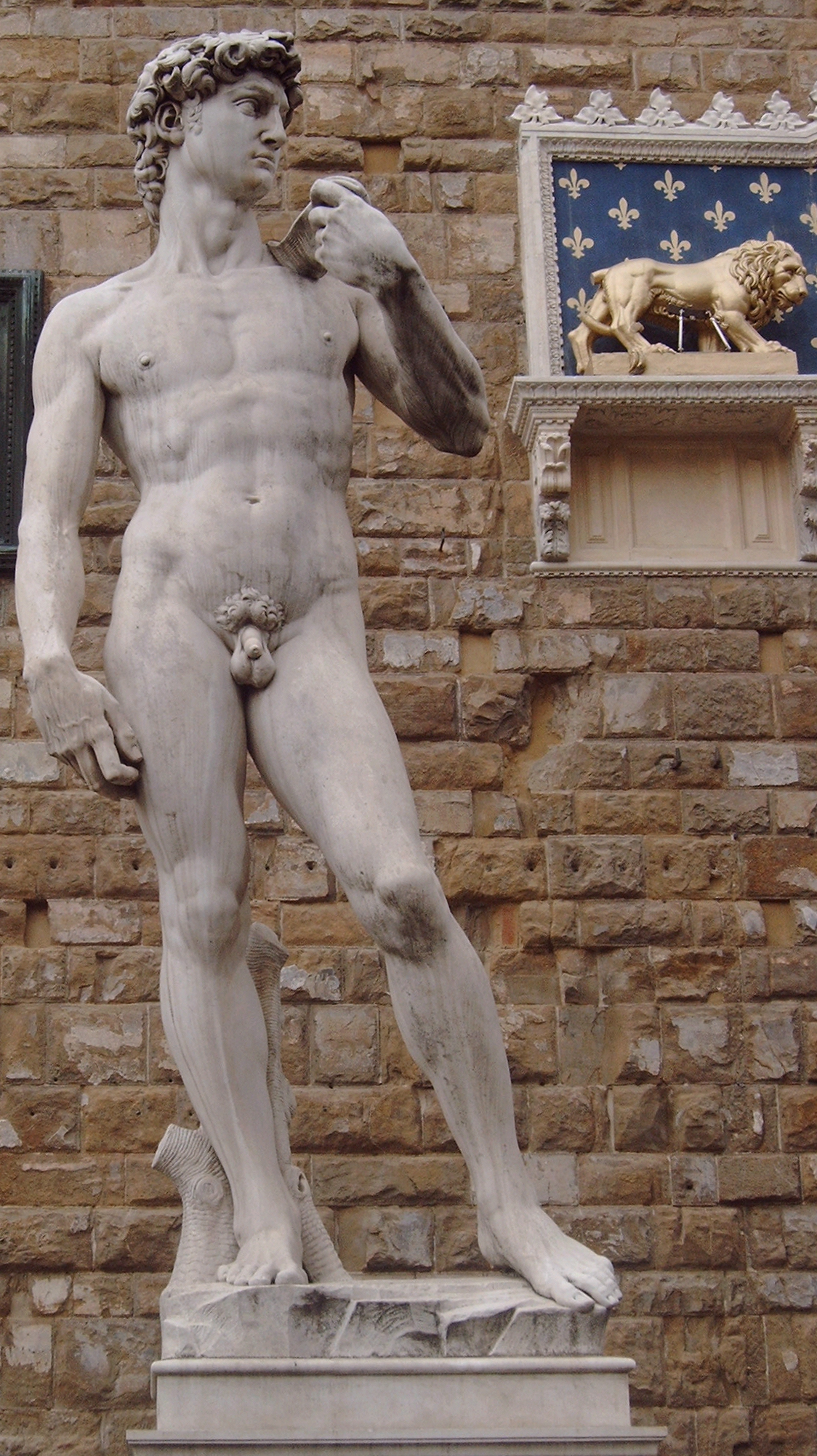 Michelangelo: David (Kopie) in Florenz vor dem Palazzo Vecchio Aufnahme: September 2005 Url